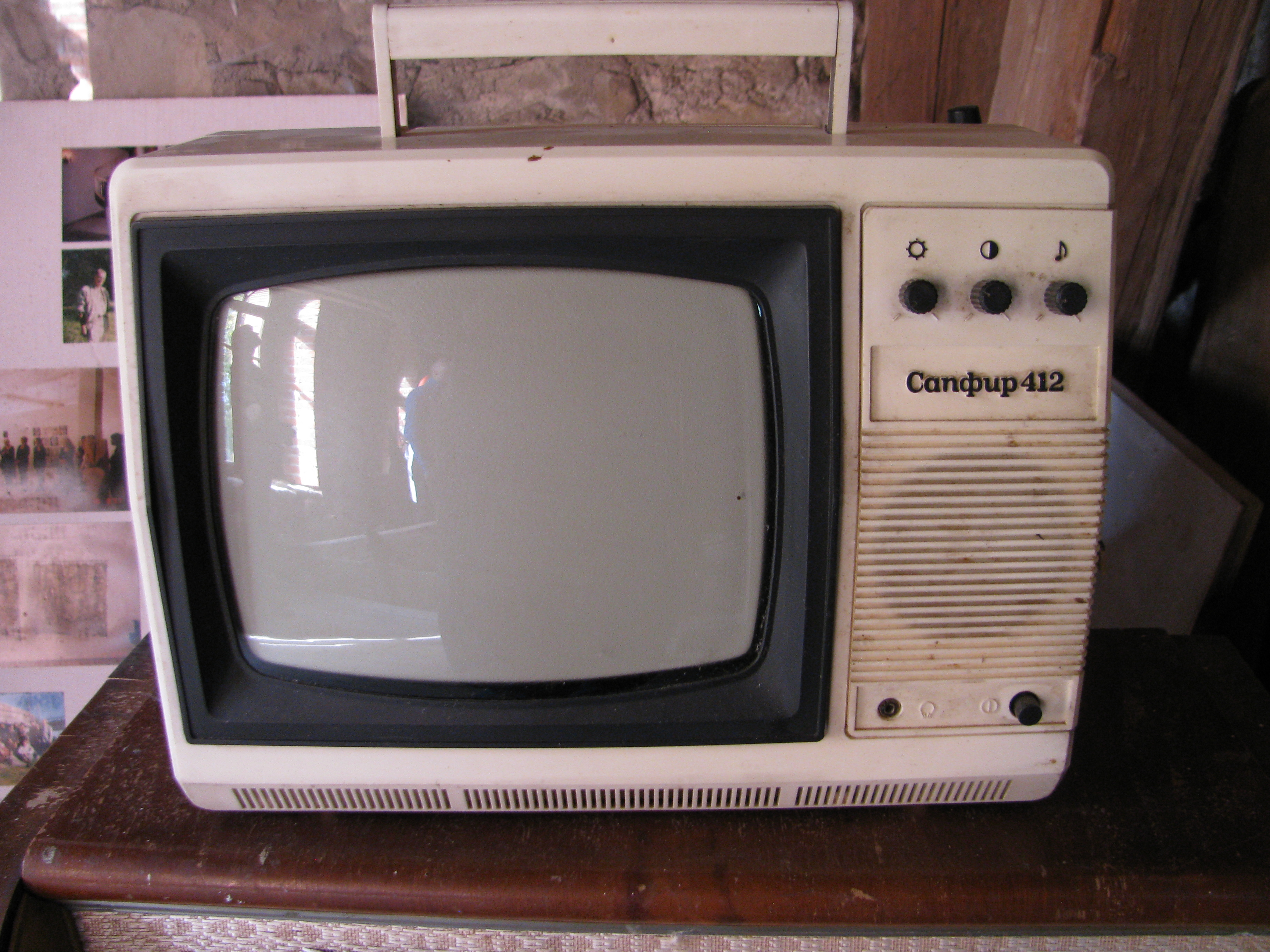 Телевизионный приёмник чёрно-белого изображения Сапфир-412